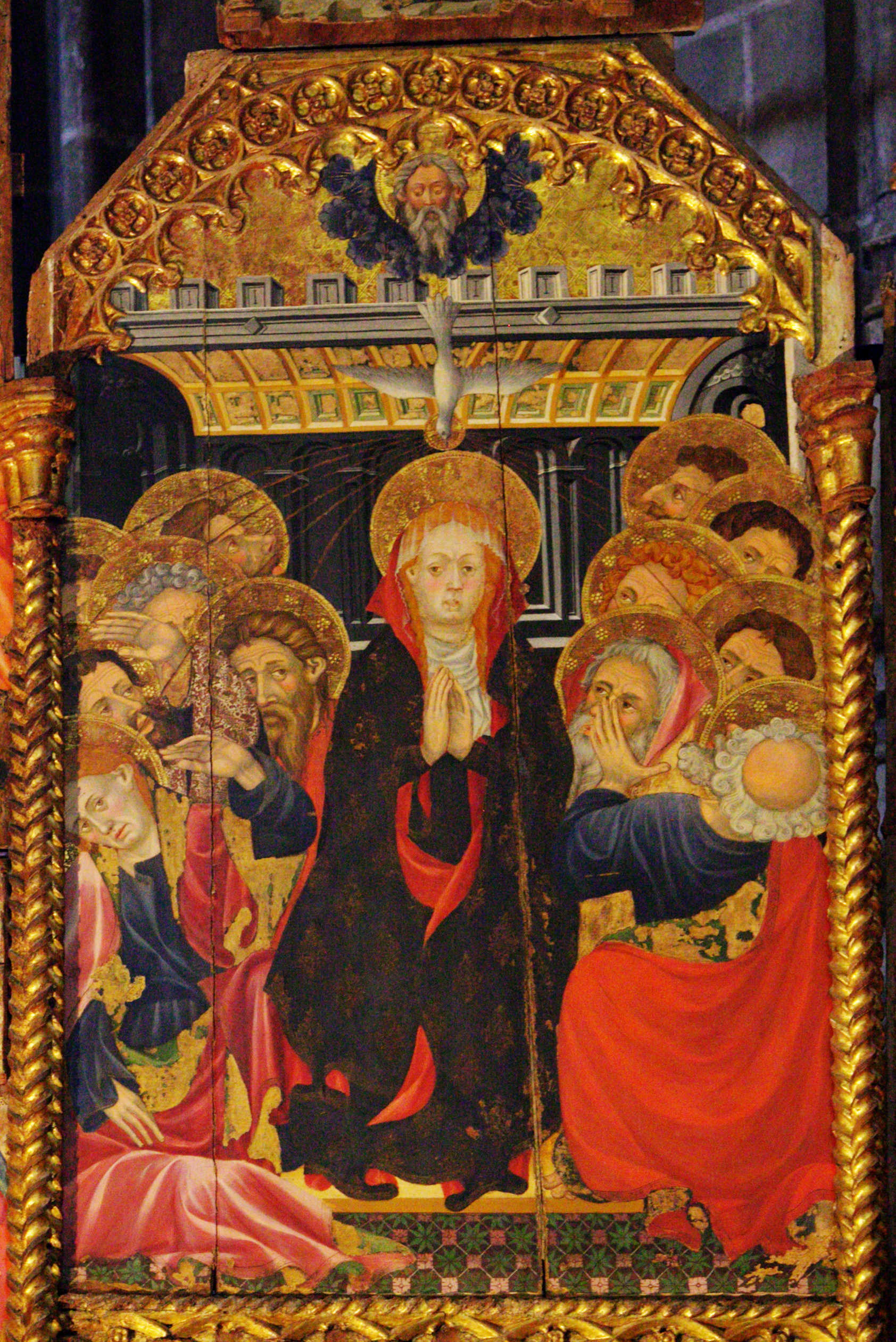 Taula de la Pentecosta de l'antic retaule gòtic del Monestir de Santes Creus. Actualment està muntat sobre una nova estructura formant un retaule més petit a la catedral de Tarragona